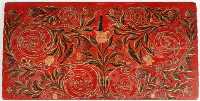 Beschilderd kistdeksel 1700 - 1800, Hindeloopen 004680 (meubilair, beschilderd), Typisch Hollands, Stichting Rijksmuseum het Zuiderzeemuseum, Enkhuizen